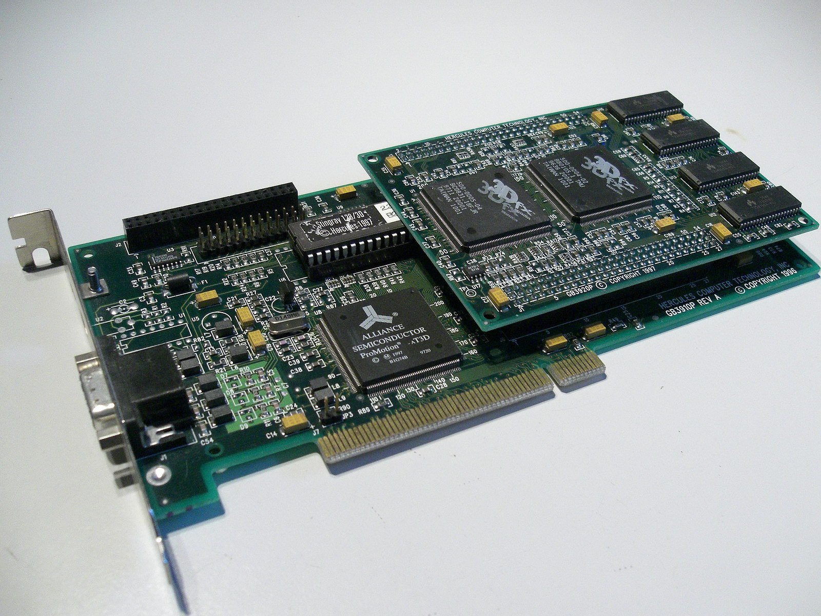 Voodoo Grafikkarte Hercules Stingray 128/3D - Doppelplatine